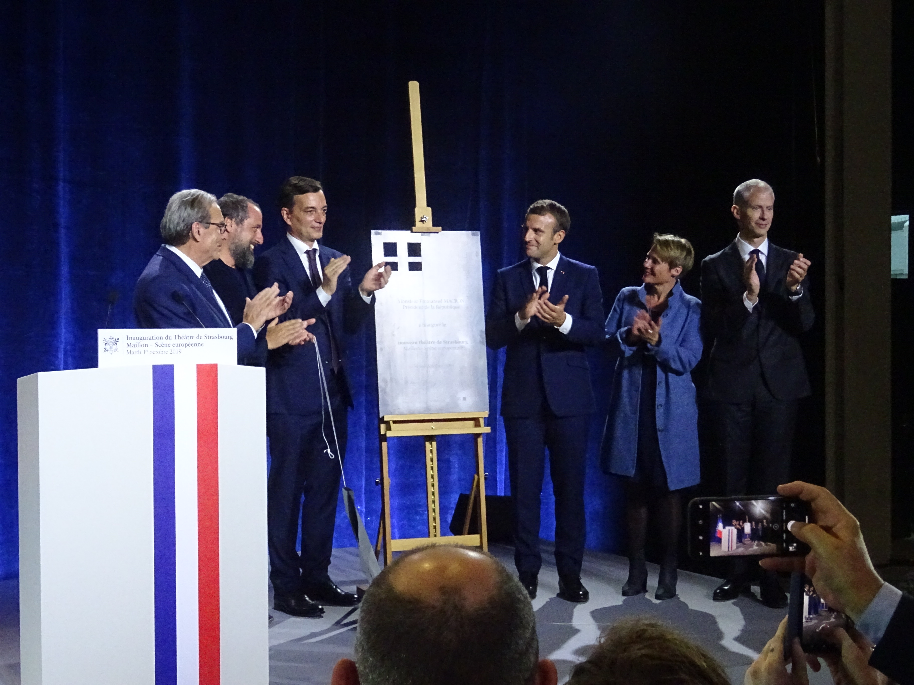 de gauche à droite, le Maire de Strasbourg, Roland Ries, l'architecte Umberto Napolitano, le premier adjoint au Maire, Alain Fontanel, le Président de la République, Emmanuelle Macron, la directrice du Maillon, Barbara Engelhardt, le ministre de la culture, Franck Riester